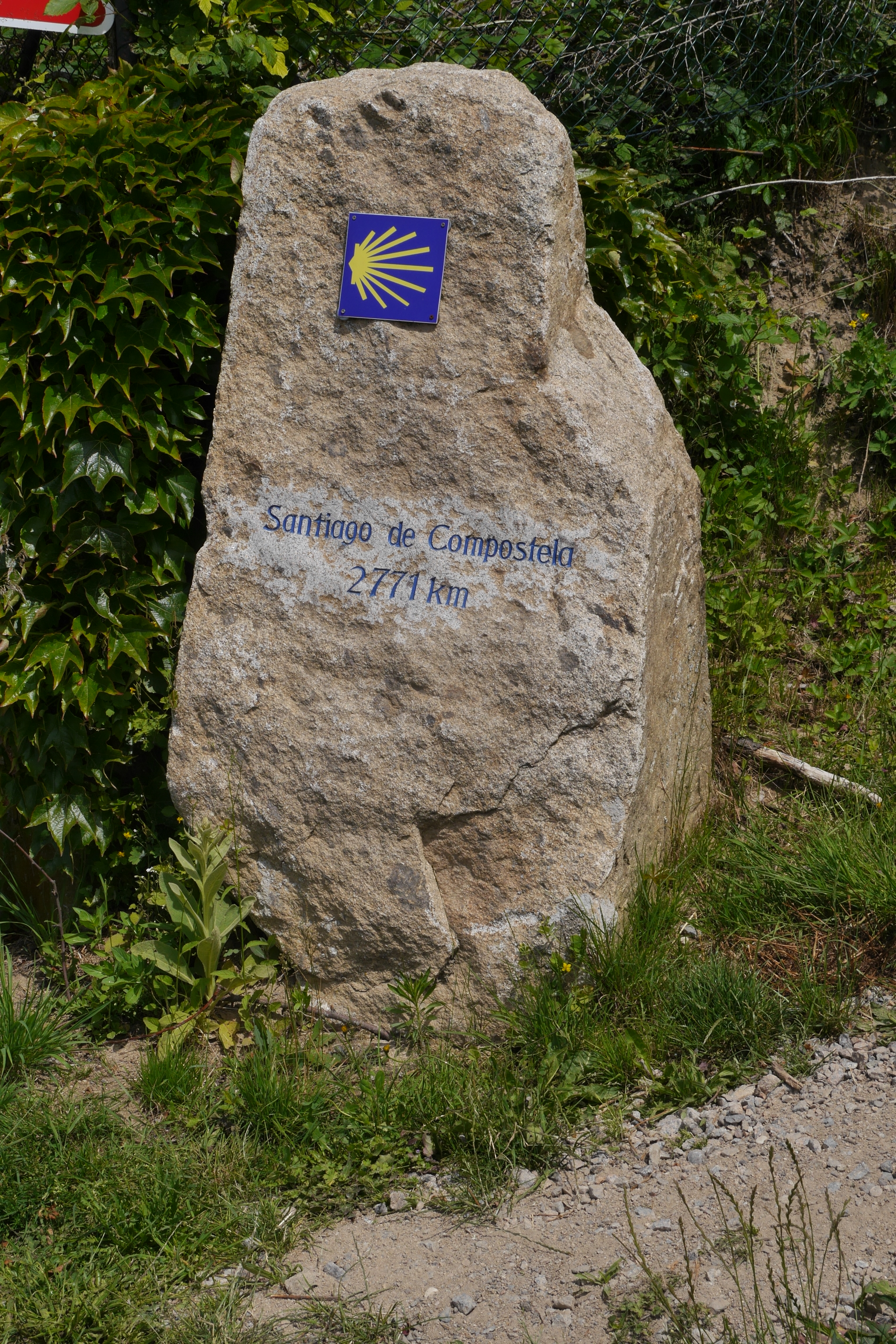 Meilenstein auf der Etappe Stallwang des Ostbayerischen Jakobswegs